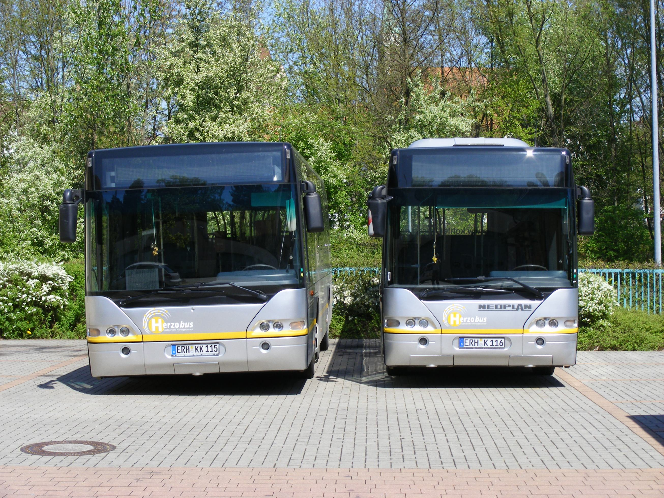 Größenvergleich Midibus Neoplan N 4411 und N 4407